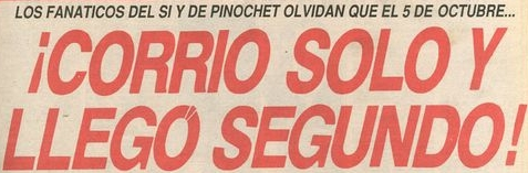 Corrió solo y salió segundo!, los fanáticos del sí y de Pinochet olvidan que el 5 de octubre...